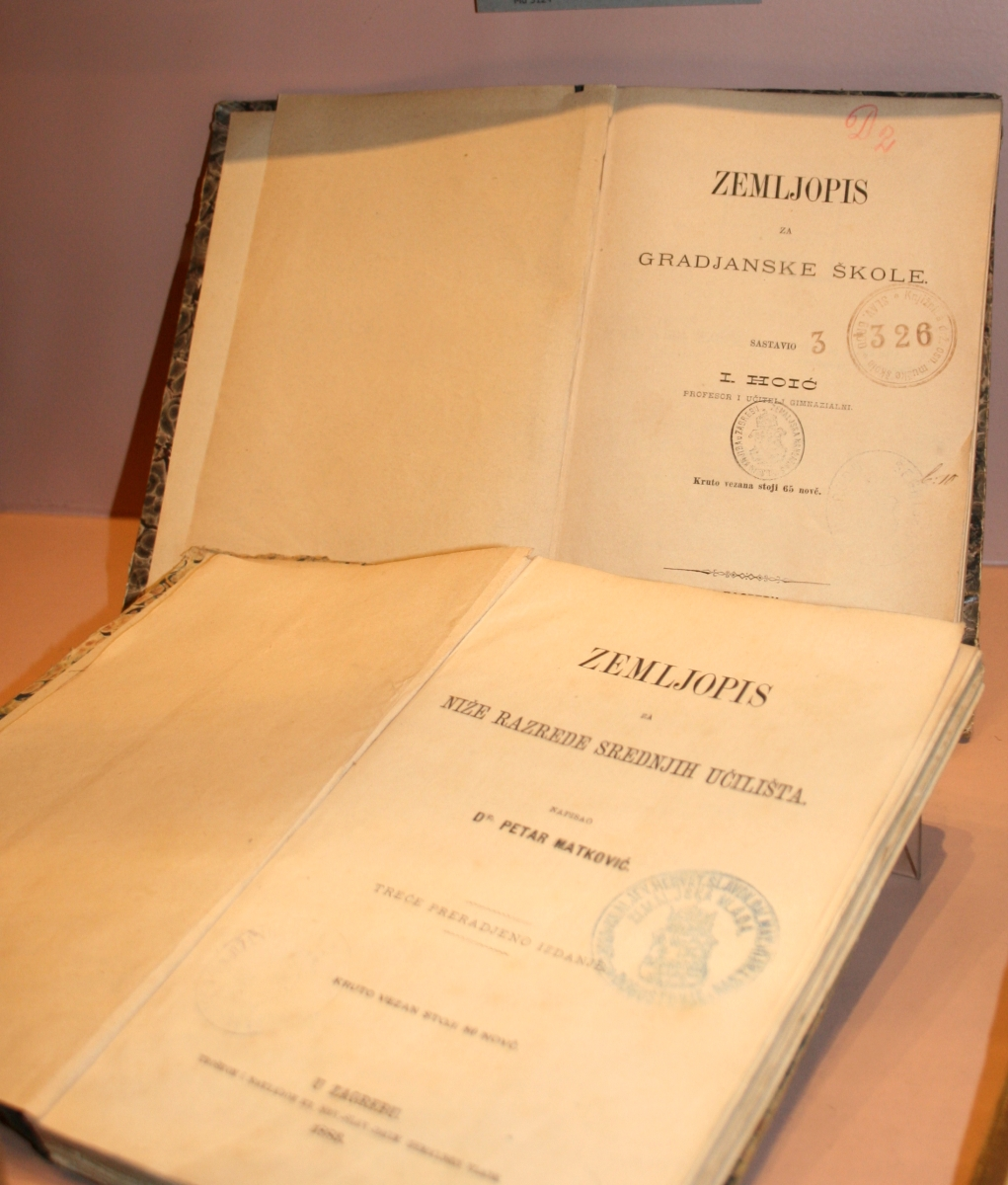 snimljeno tijekom Noći muzeja